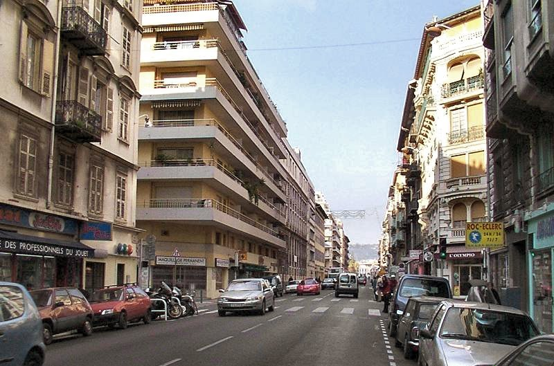 Nice - Quartiers de Nice Nice - Quartier de Riquier Vue générale de la rue Barla (axe Nord-Sud) Photo 11/2004, prise de vue vers le Nord avec Kodak DC3200